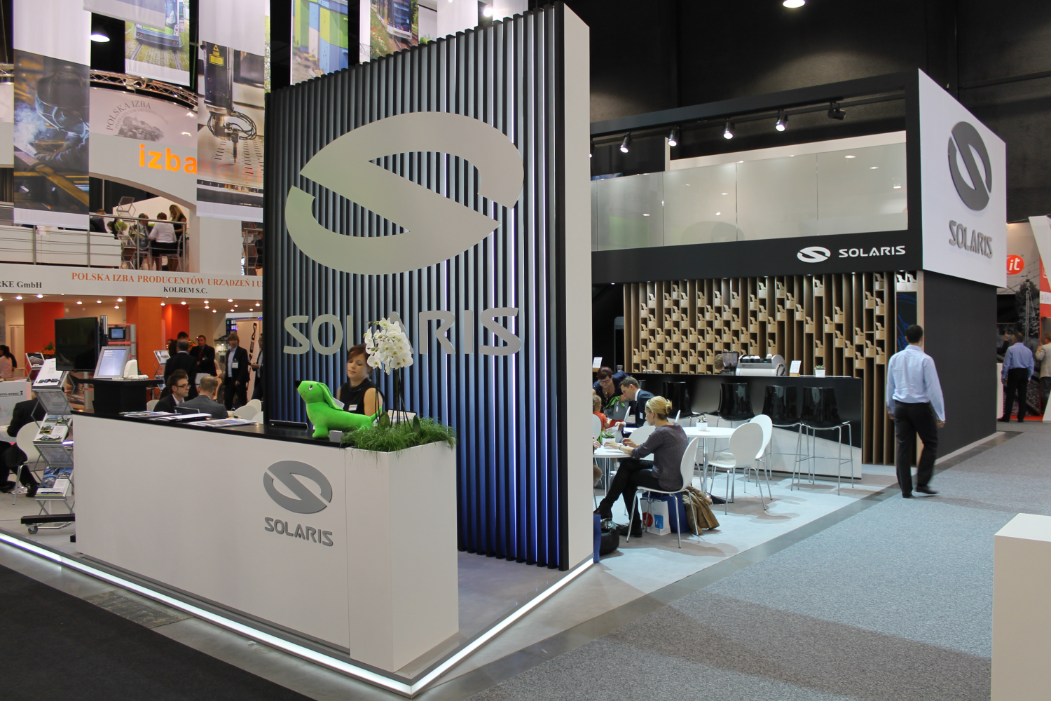 Stoisko Solarisa podczas targów Trako 2015. The making of this document was supported by Wikimedia Polska Association, within Wikigrant no. WG 2015-34. English | polski | +/−